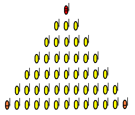 על פי התמונה ב: The army of Alexander the Great מאת ניק סקונדה, הוצאת אוספרי, עמוד 13